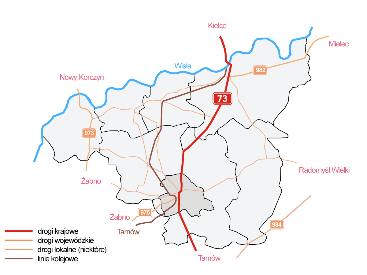 Ważniejsze połączenia drogowe i kolejowe na terenie powiatu dąbrowskiego.